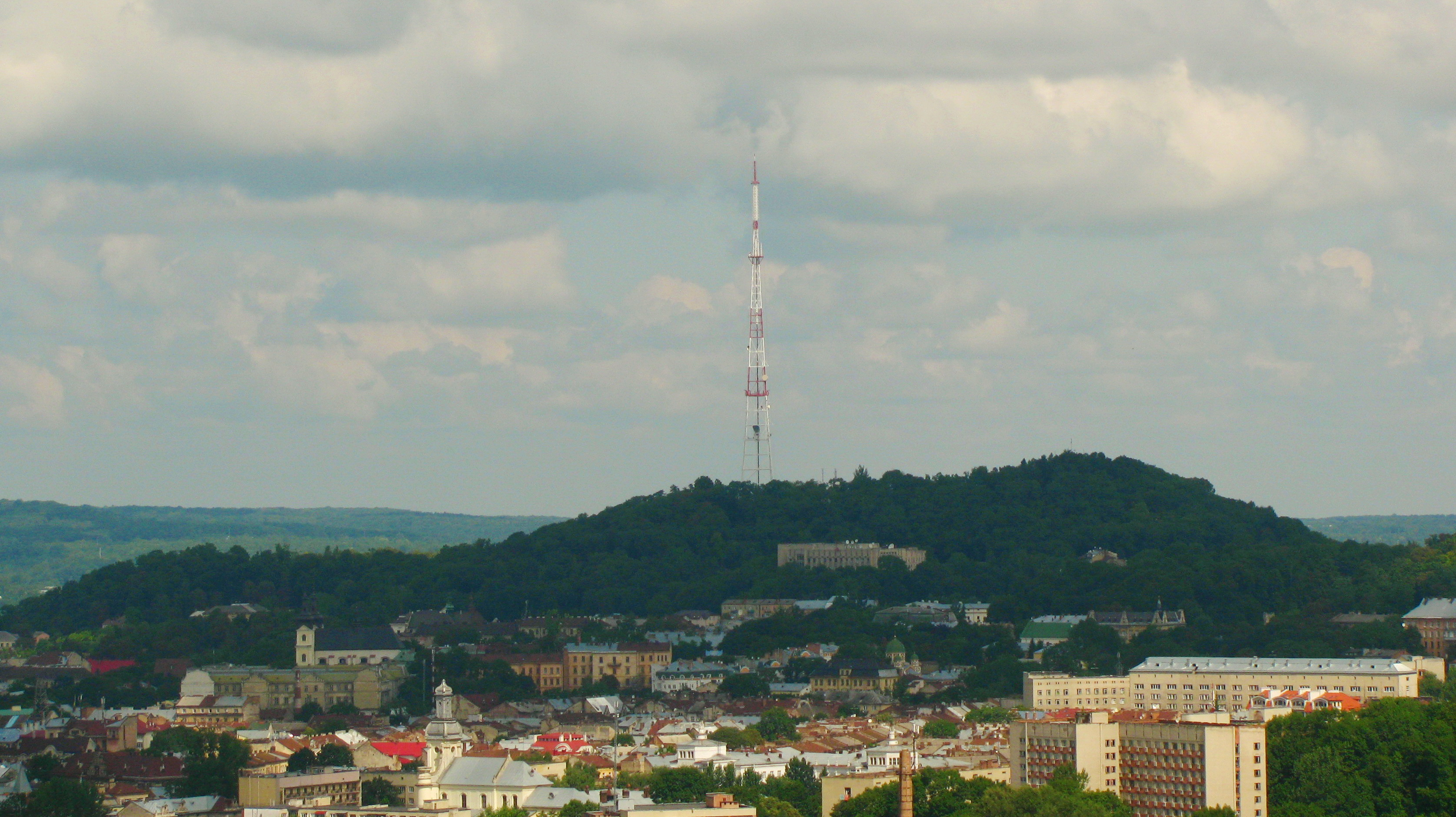 Замкова гора у Львові.